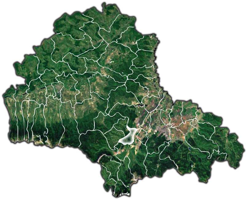 Vulcan jud Brasov